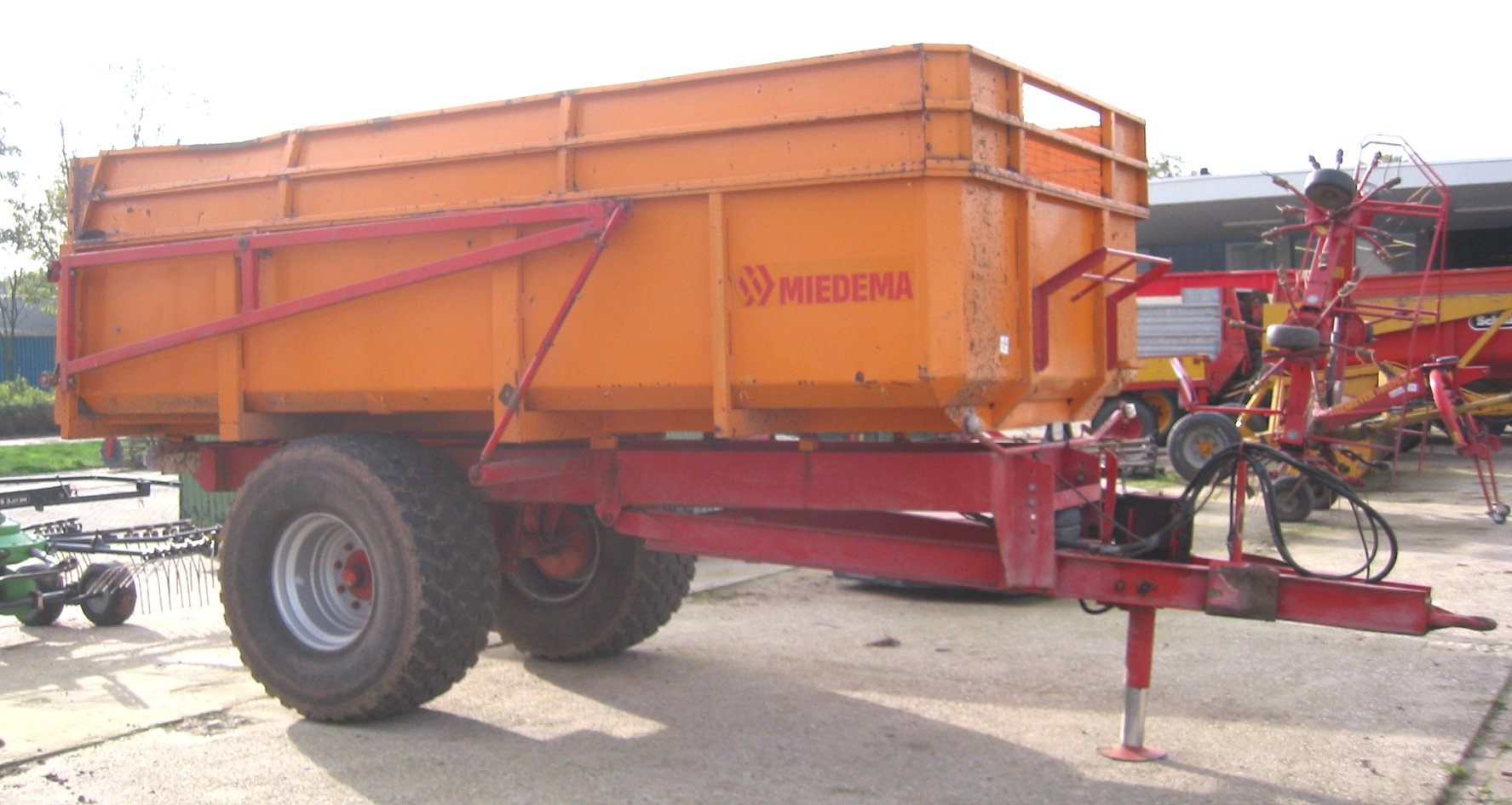 Miedema aanhangwagen, eenassige kipper om met een tractor te trekken